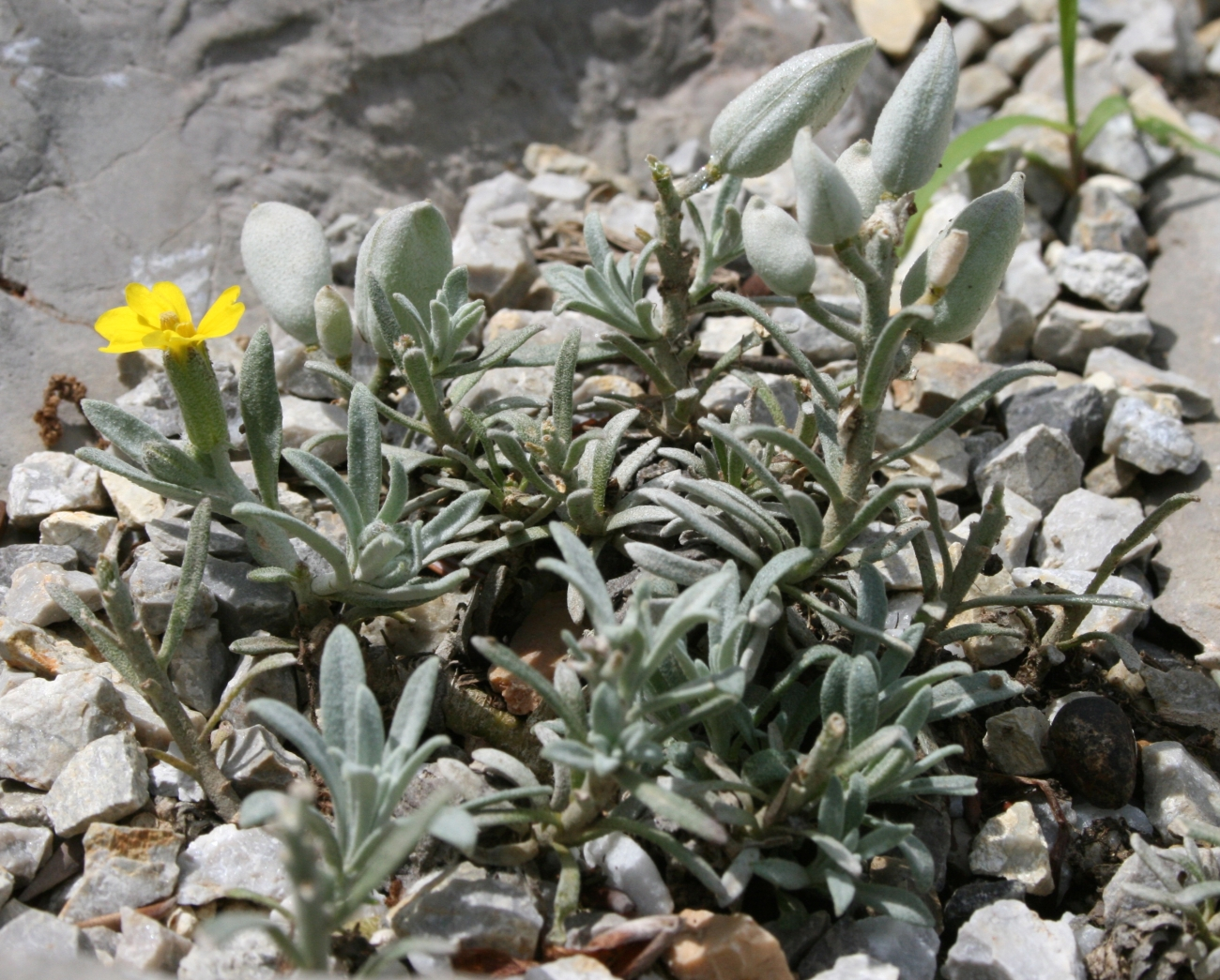 Velebitska degenija Degenia velebitica snimljena u Botaničkom vrtu u Zagrebu.